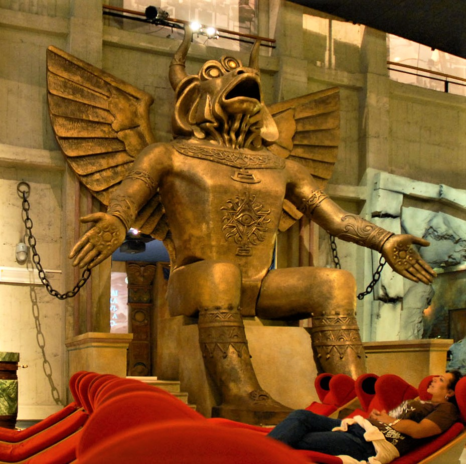 Au centre, la statue du Dieu Moloch du film "Cabiria" de Giovanni Pastrone. Museo nazionale del Cinema (Turin)